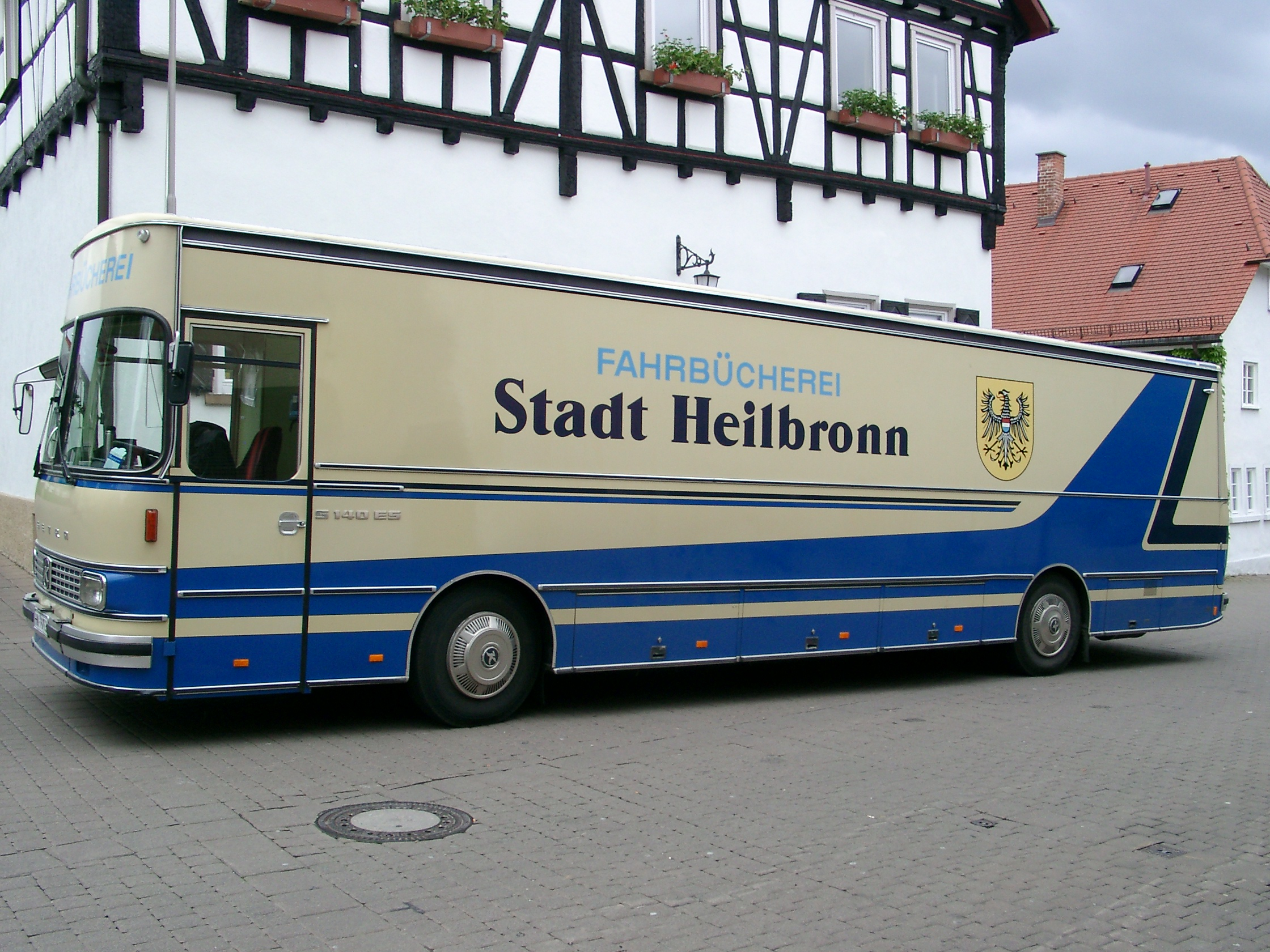 Heilbronn, Fahrbücherei vor dem Rathaus des Stadtteils Neckargartach